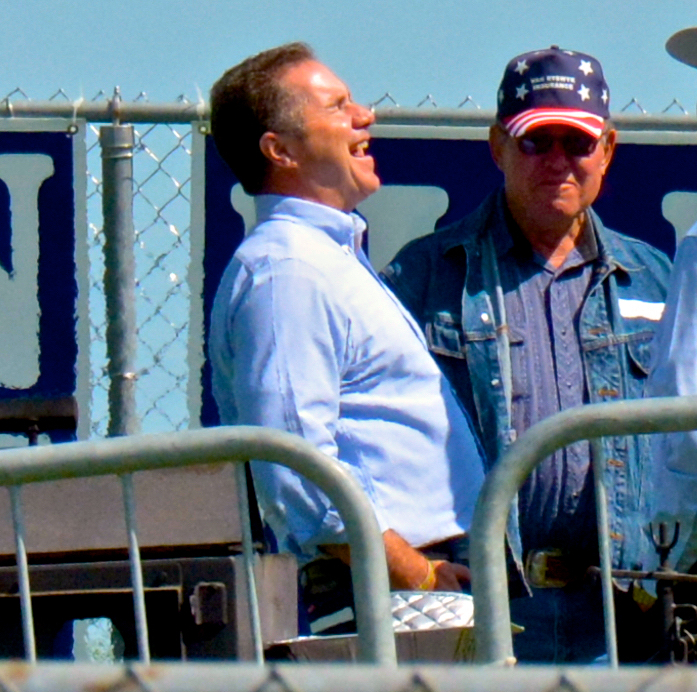 bruce